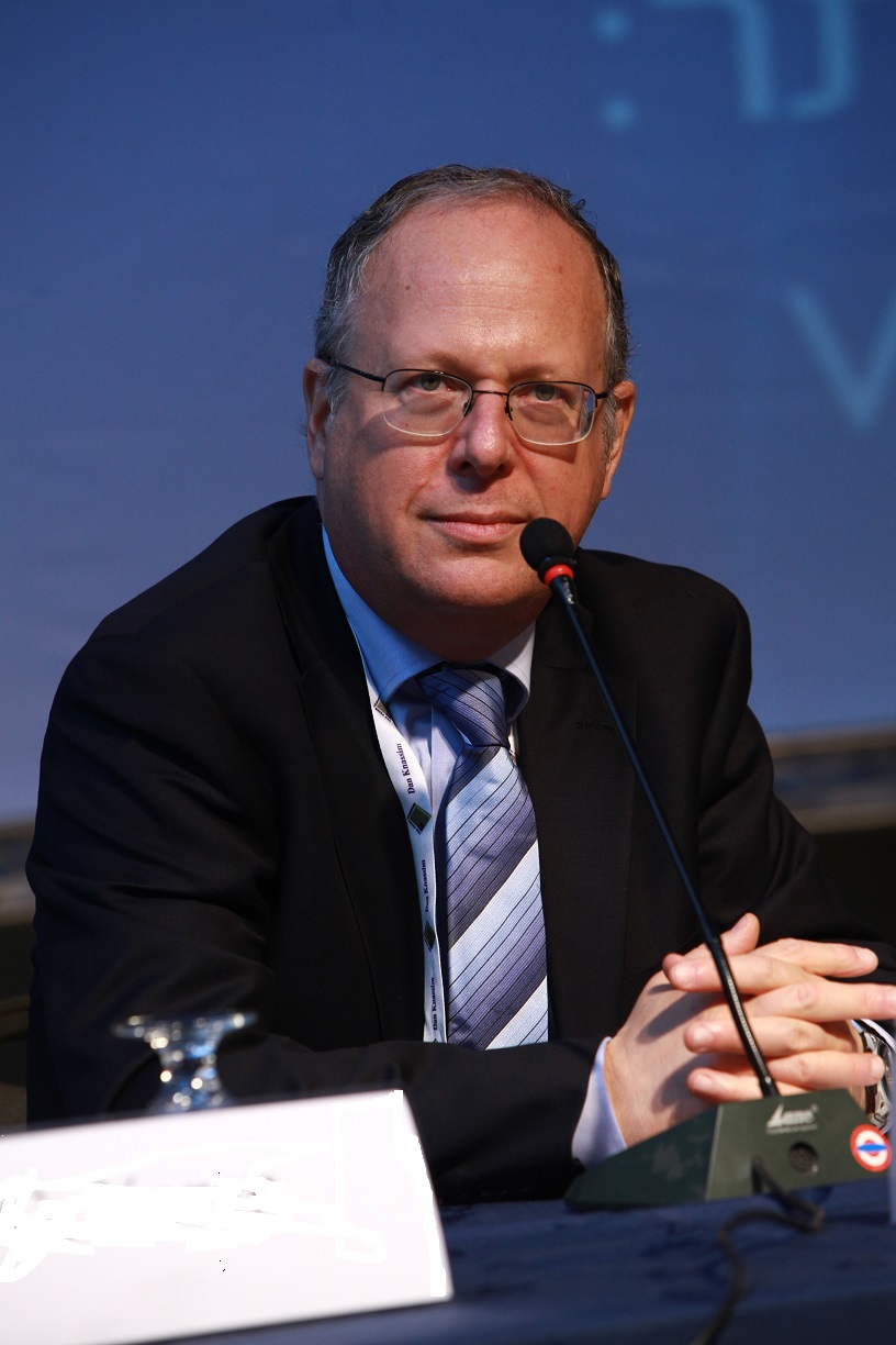 דורון זגר - קרדיולוג, פרופסור מן המנין לקרדיולוגיה באוניברסיטת בן-גוריון בנגב, משנת 2016 מכהן כמנהל המערך הקרדיולוגי במרכז הרפואי האוניברסיטאי סורוקה . הוא נשיא האיגוד הקרדיולוגי בישראל החל מ-2019